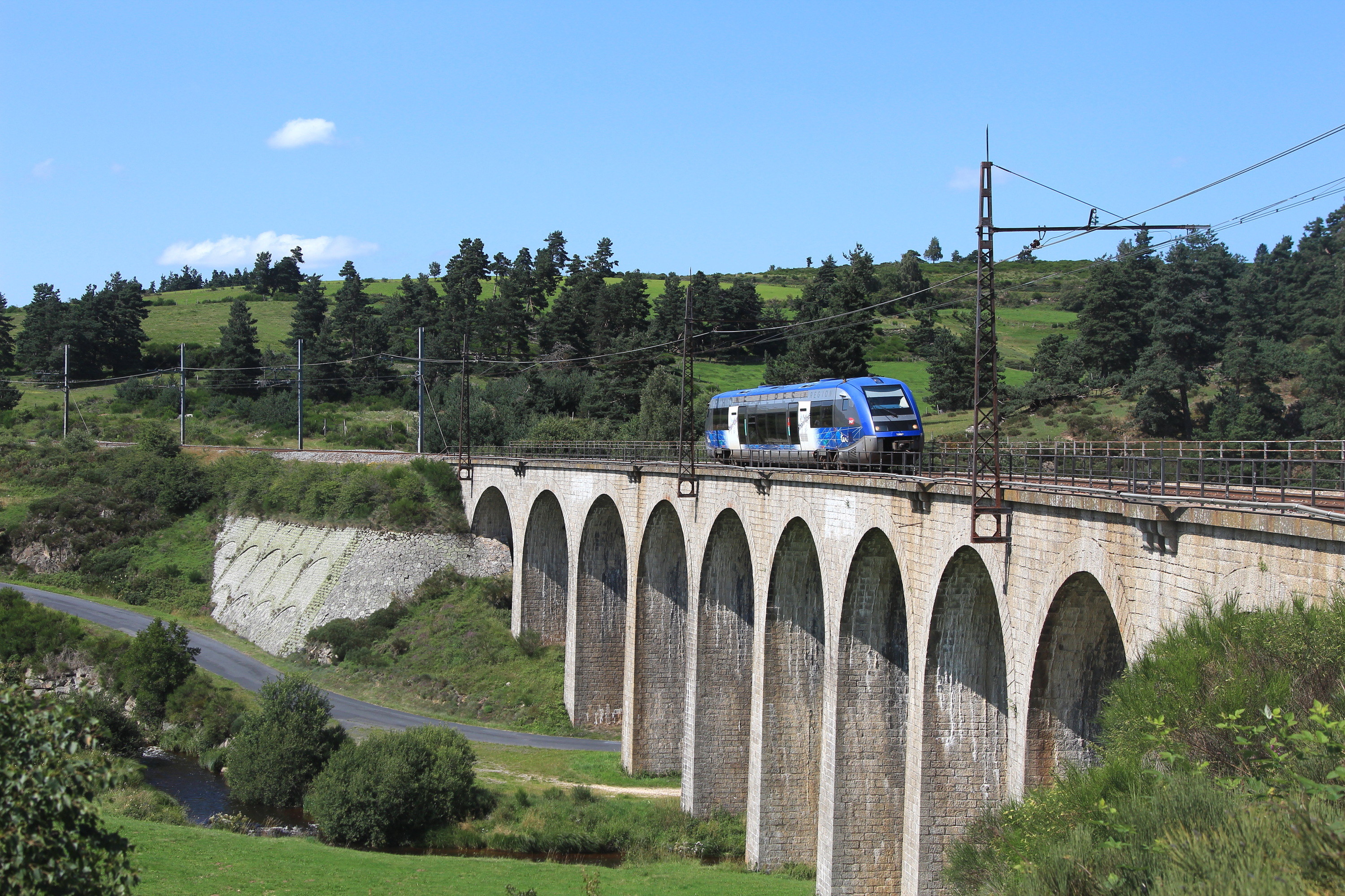 L'X 73607 en livrée Rhône-Alpes assurant l'Aubrac descendant (IC15941 Clermont-Ferrand - Béziers) sur le viaduc de la Rimièze.